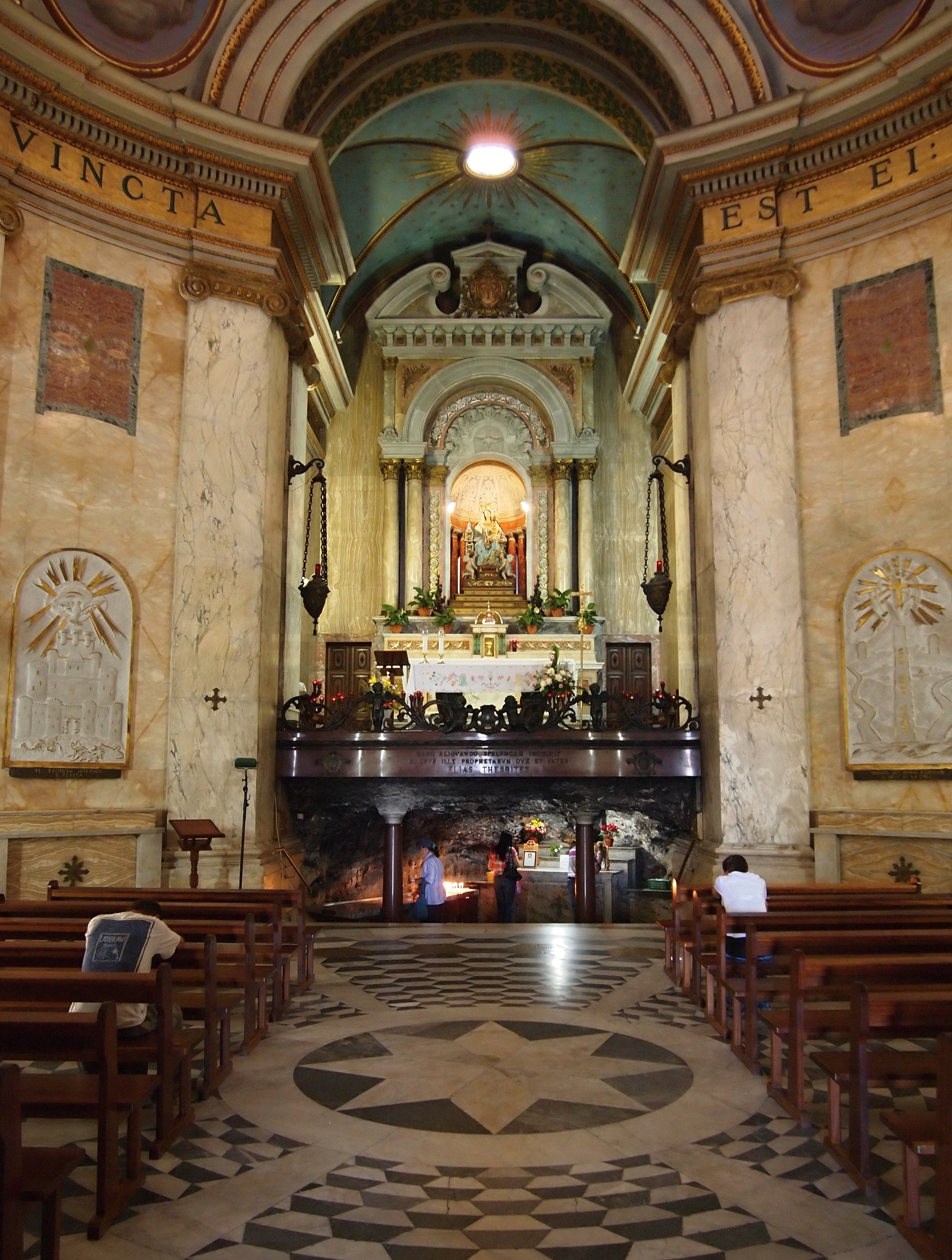 כנסייה בסטלה מאריס, מבט מבפנים